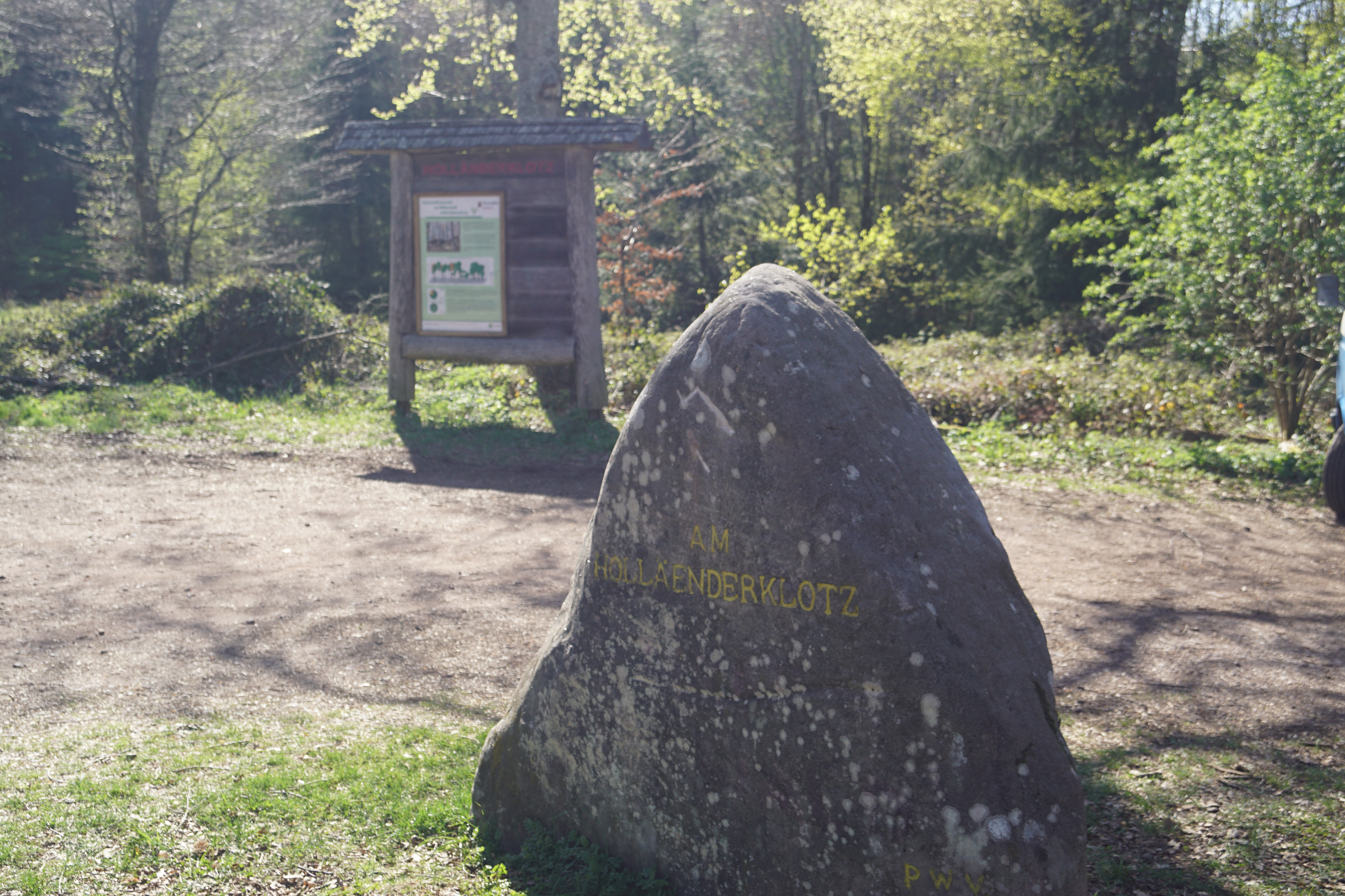 Ritterstein Holländerklotz am Weißenberg